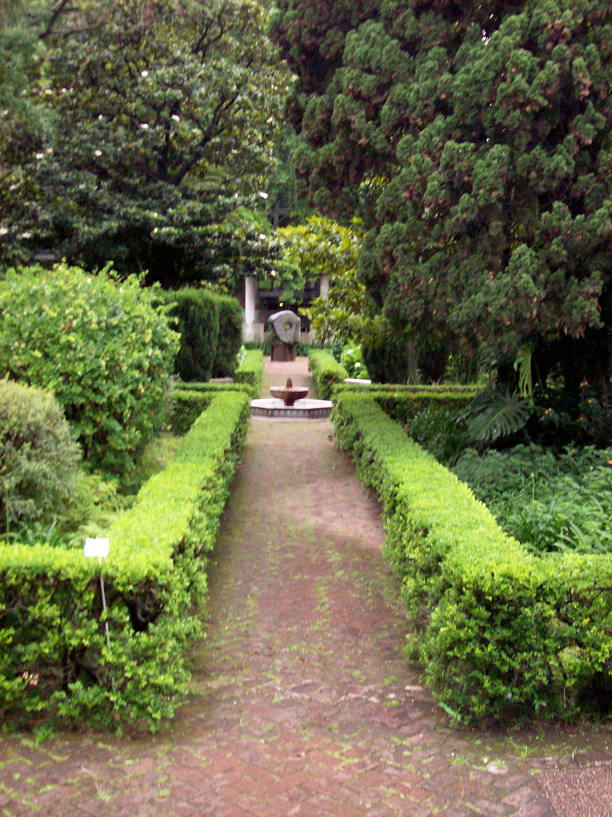 Museo de Arte Español Enrique Larreta, en Avenida Juramento, barrio de Belgrano, Buenos Aires, Argentina: cerco de boj que conduce a la fuente.